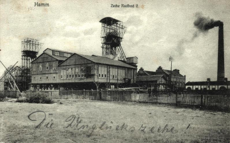 Zeche Radbod (Familienarchiv Schulte, Postkartensammlung: gelaufen 1908), Urheber: Andreas Schulte